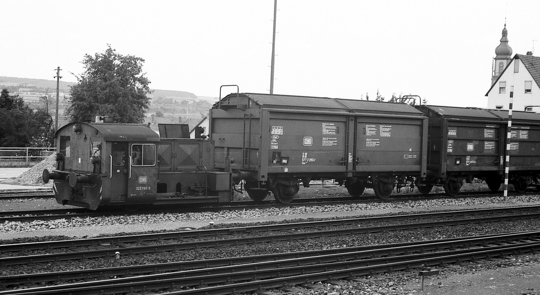 DB 323 760-9 (Köf II) rangiert in Tauberbischofsheim, 1984. Kleinlok bediente bis in die 1990er Jahre das Gewerbegebiet am ehem. Bhf. Dittwar.